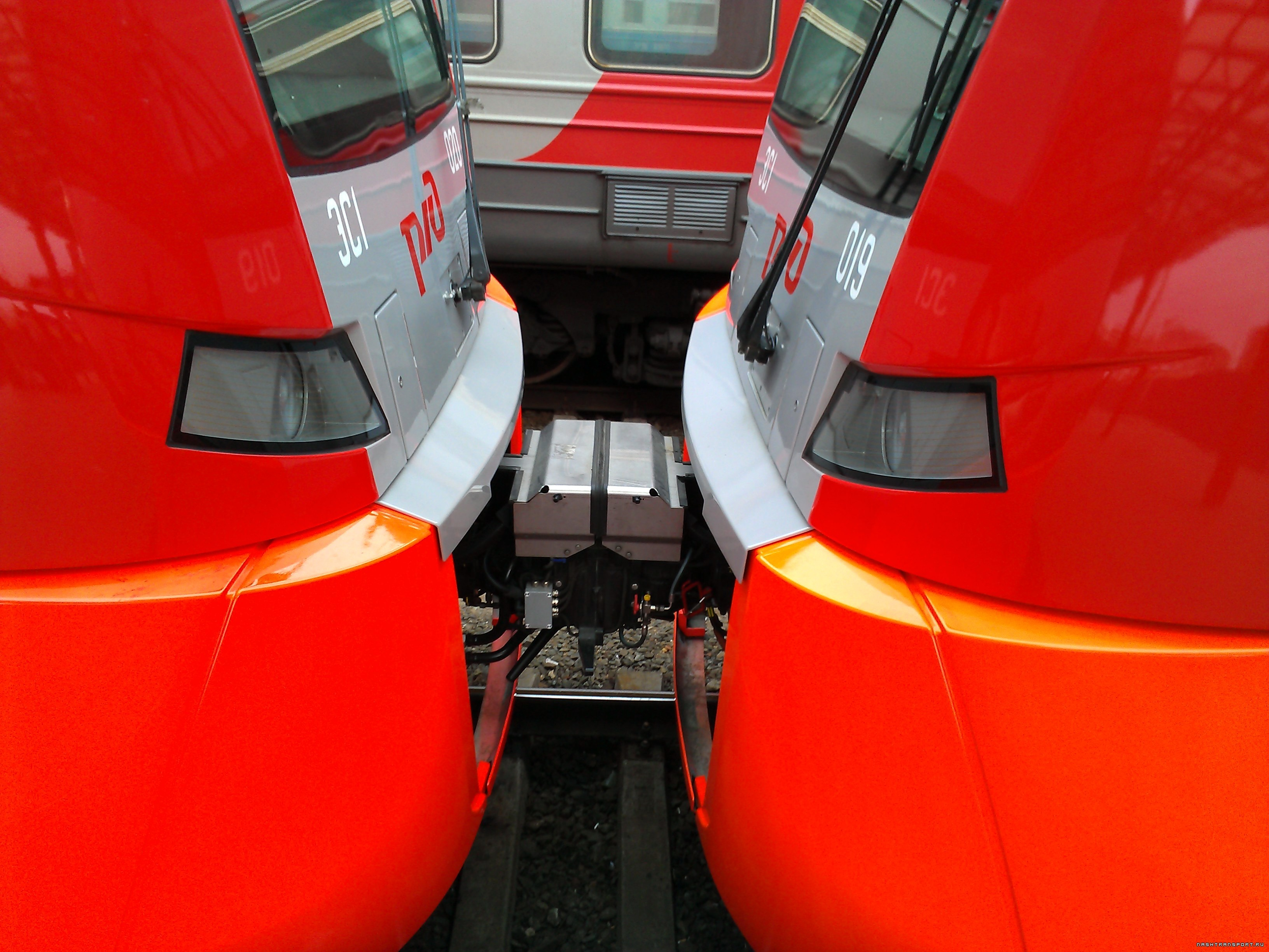 Сцепка электропоездов ЭС1-019 и 020